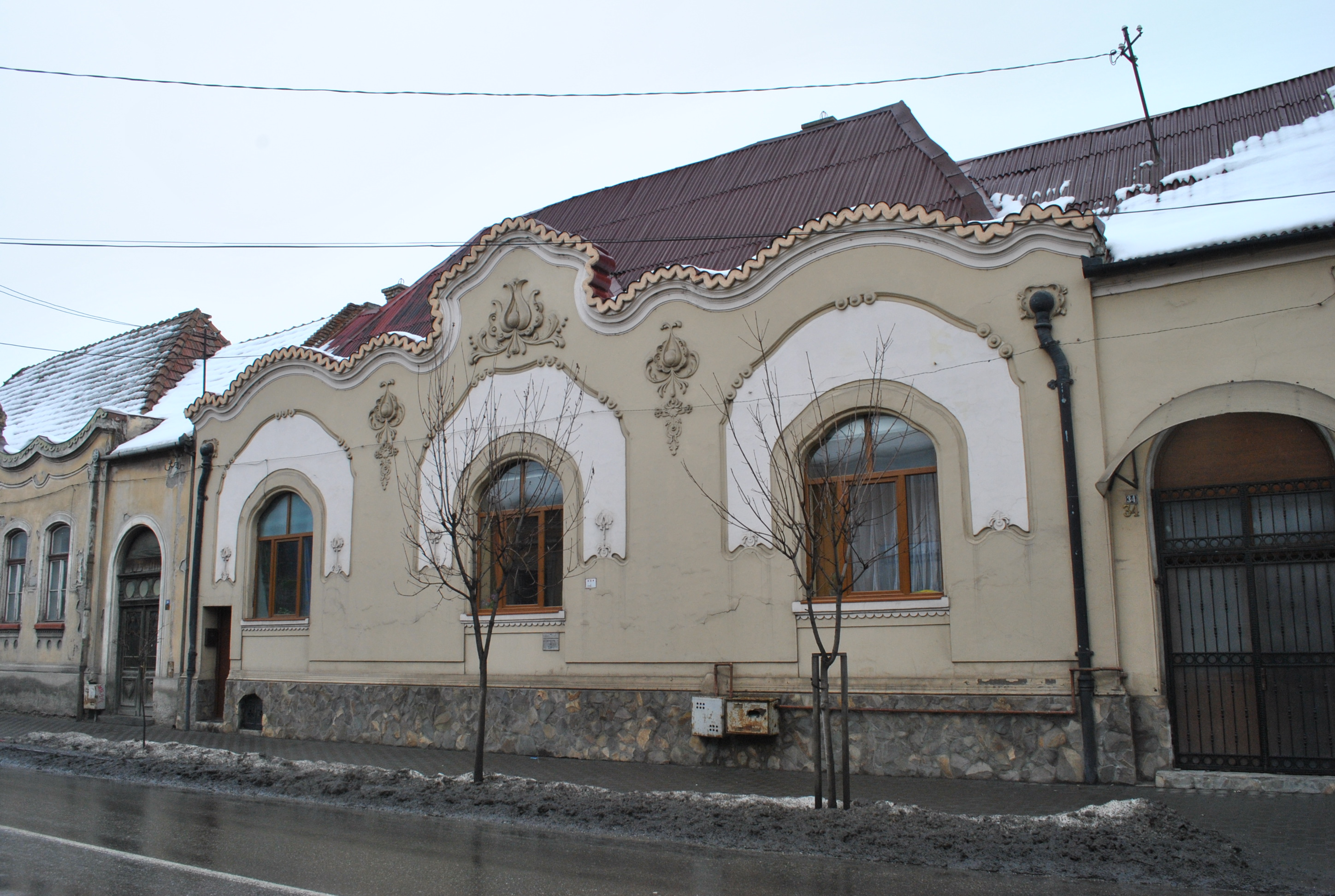 Casă, 1910 - 1916